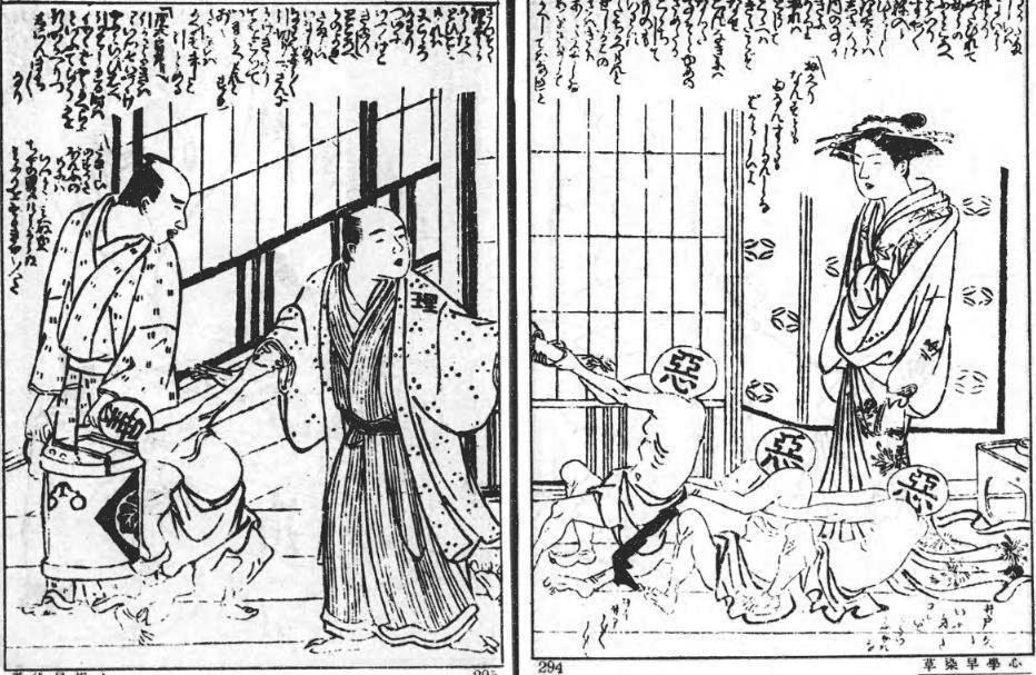 黄表紙『心学早染草』 山東京伝作，北尾政美画。1790年刊。当時流行した心学を趣向にし、主人公の体内に悪玉が入って性格が変わるが、道理先生の教えで目がさめ、体内の悪玉も善玉によって滅ぼされる話。